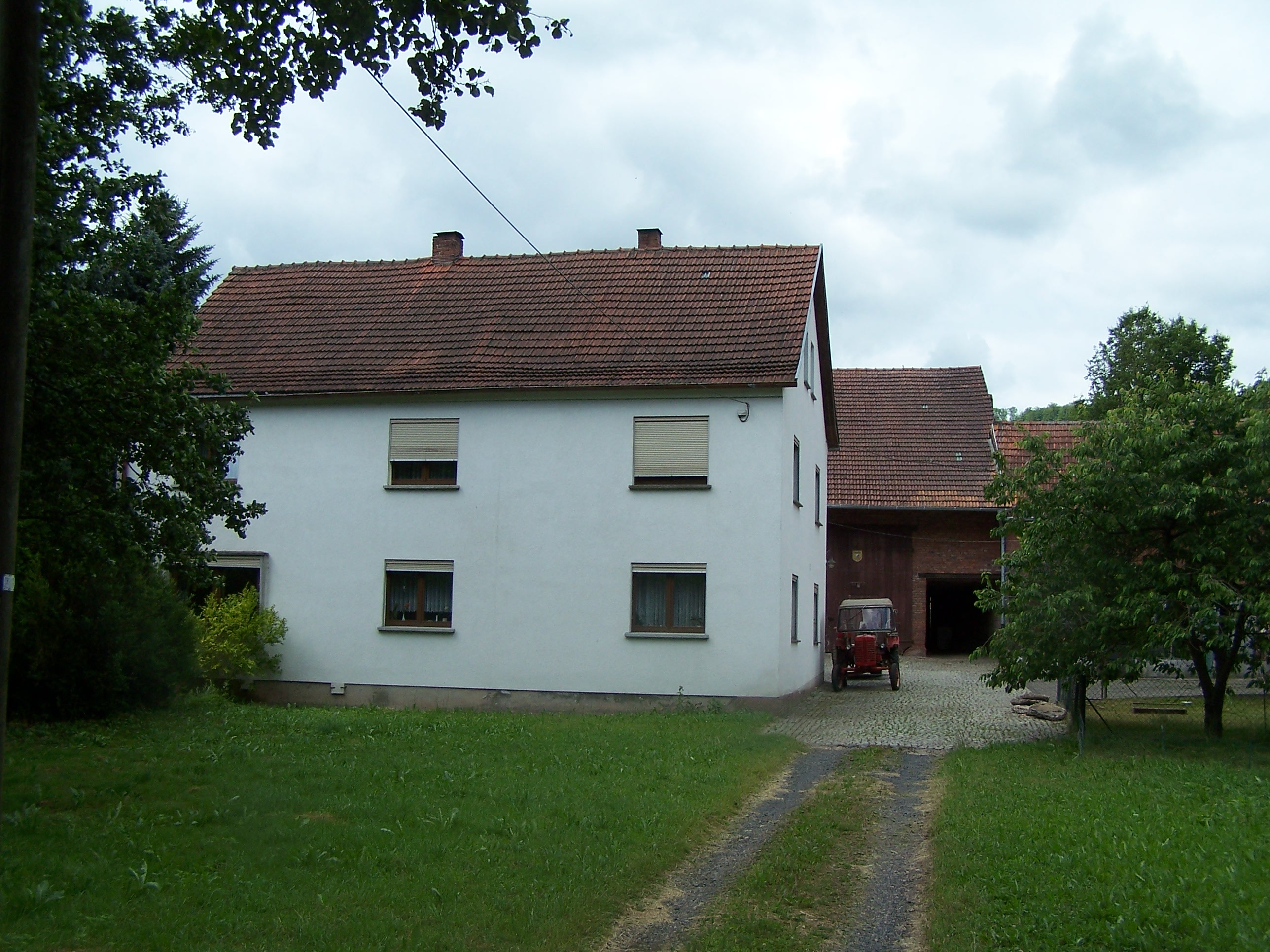 Die Furtmühle an der Oechse bei völkershausen, Stadt Vacha.